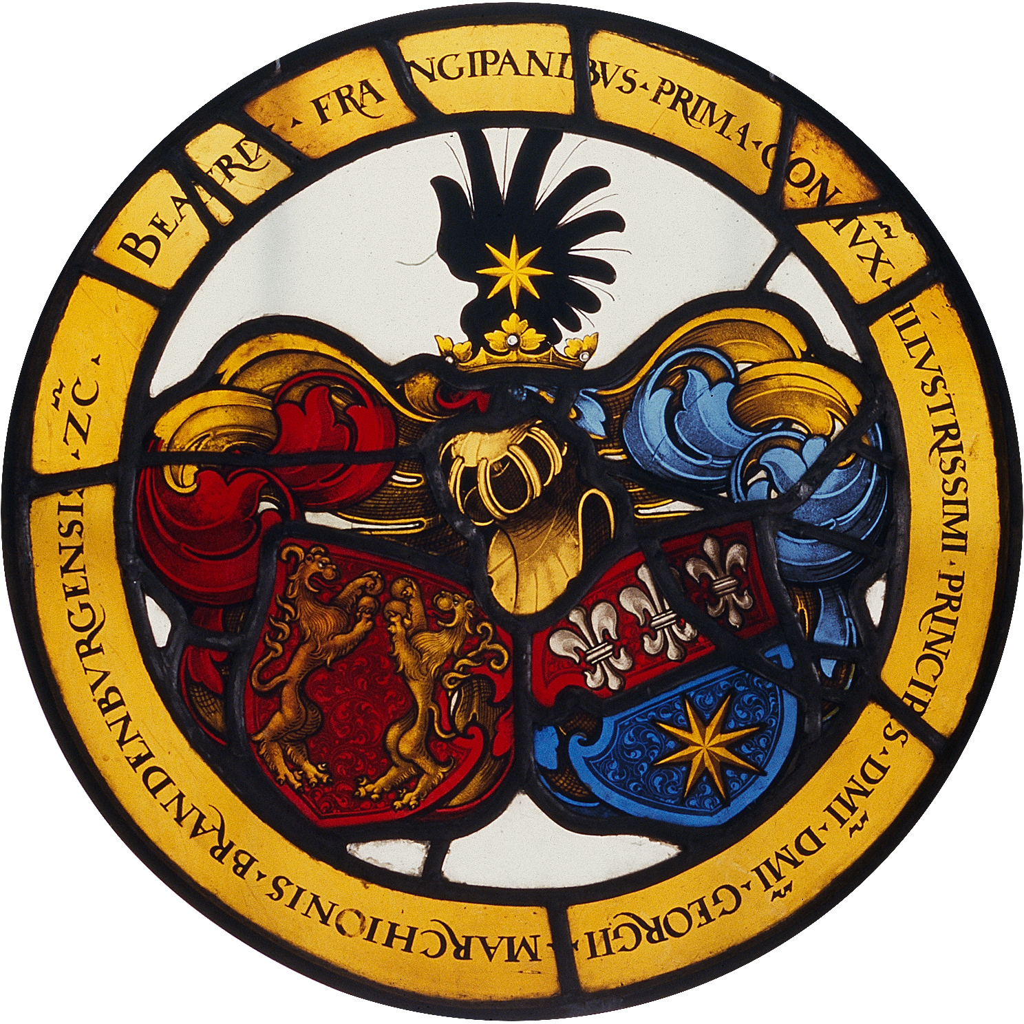 Rundwappen Beatrix von Frangipan de Band X,1 Objektinformationen: Gattung: Glasmalerei Scheibe Position: n • Fenster II, Zeile 2, Bahn b